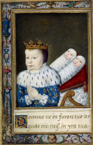 Miniatura estratta da un libro di preghiere di Caterina de' Medici, raffigurante Luigi, Vittoria e Giovanna di Valois, figli di Caterina.